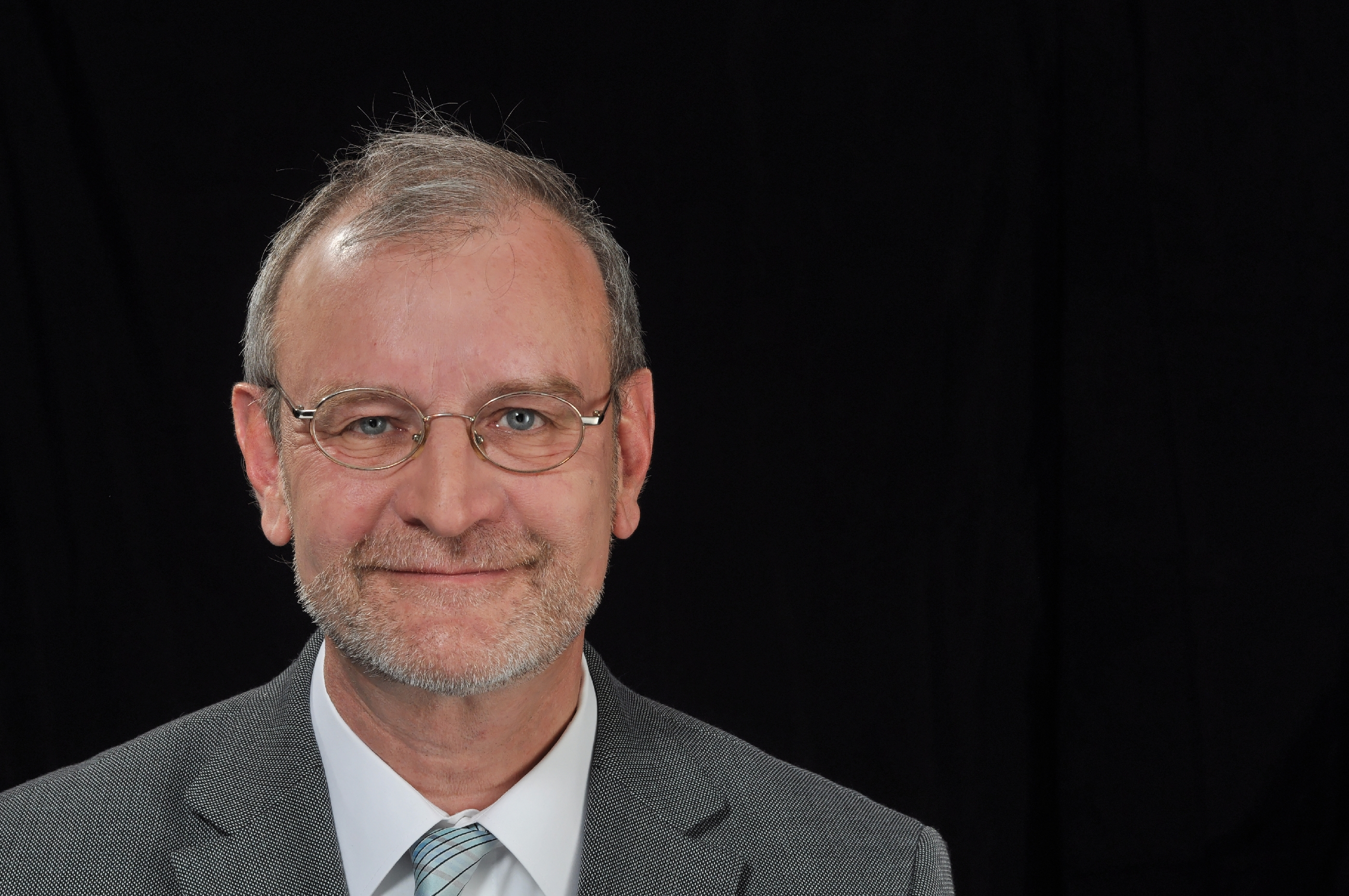 Jörg Fritz 2013 Personality rights warning Although this work is freely licensed or in the public domain, the person(s) shown may have rights that legally restrict certain re-uses unless those depicted consent to such uses. In these cases, a model release or other evidence of consent could protect you from infringement claims.